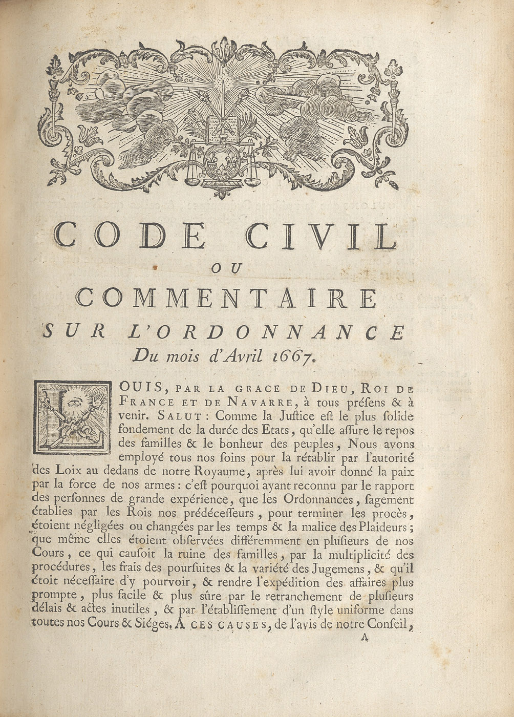 Code civil, ou commentaire sur l'ordonnance, Du mois d'Avril 1667